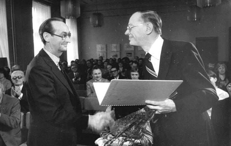 ADN-ZB-Rehfeld-18-3-80- Berlin: Käthe-Kollwitz-Preis verliehen - Die Akademie der Künste der DDR hat den Käthe-Kollwitz-Preis des Jahres 1980 verliehen. Mit dem Preis, der für eine volksverbundene und realistische Kunst vergeben wird, wurde das künstlerische Werk des Bildenden Künstlers Werner Tübke (r) geehrt. Hier gratuliert Werner Klemke, der die Laudatio für den Leipziger Künstler und Hochschullehrer Tübke sprach.